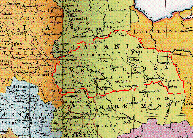 Heiliges Römisches Reich um 1000, Ausschnitt Mark Lausitz